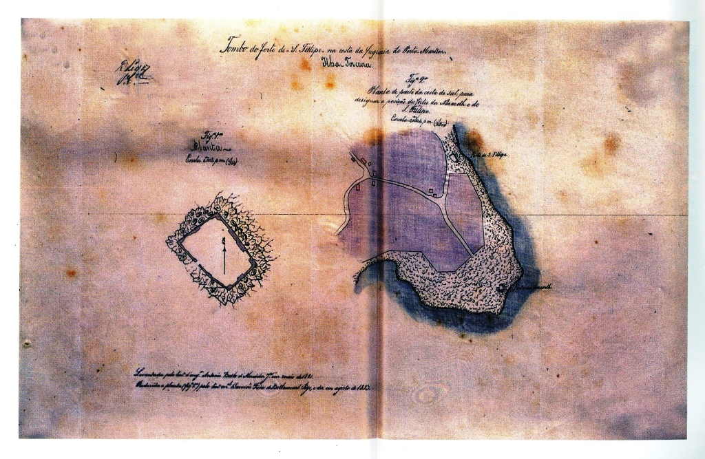 "Tombo do forte de S. Filipe, na costa da freguesia do Porto Martim", Ilha Terceira (Açores), Portugal.